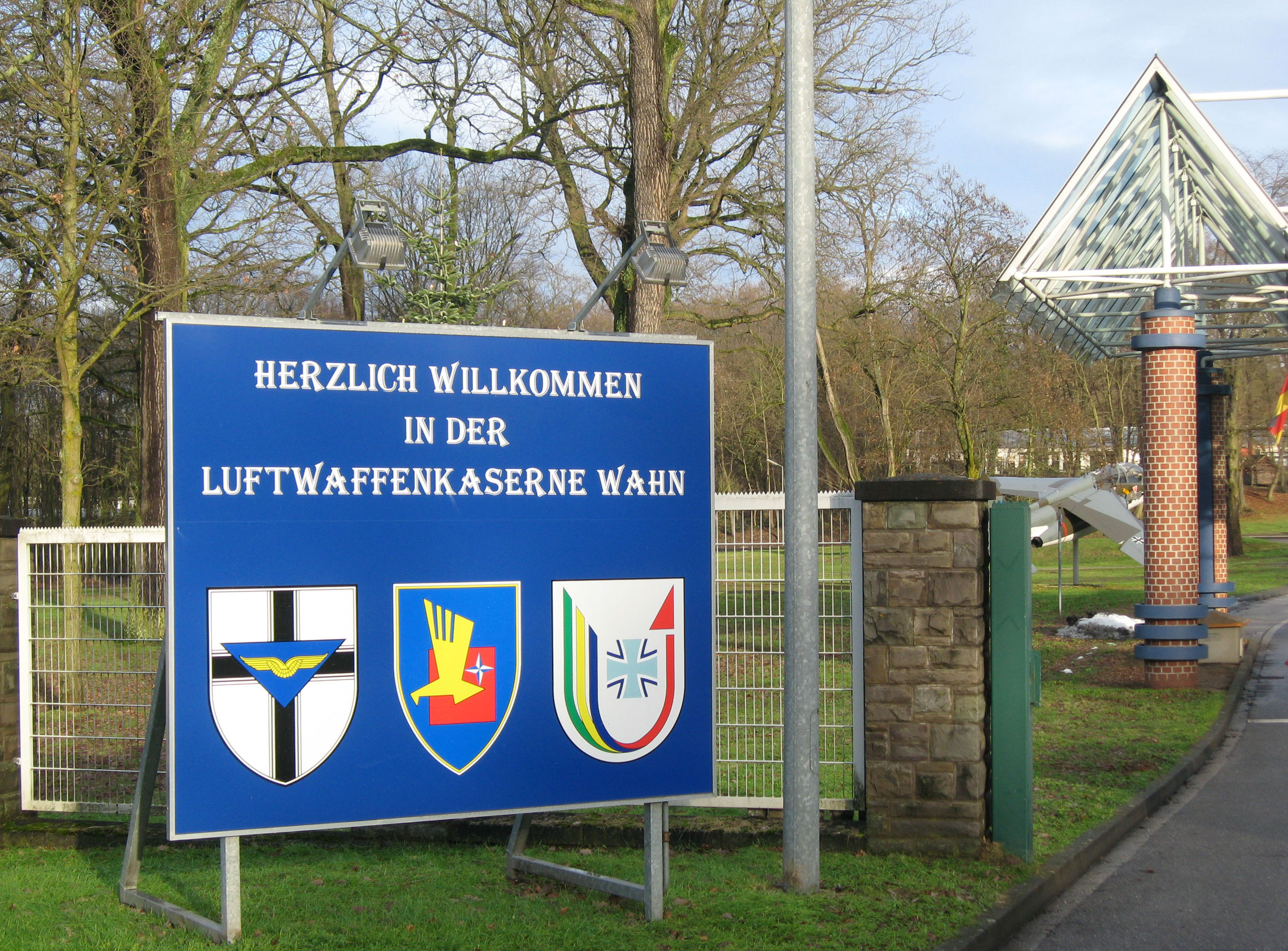 Zufahrt zur Hauptwache der Luftwaffenkaserne Wahn (Köln-Porz-Wahn) Datum: 08.01.2011 Urheber: B. Neulich alias Benutzer:Neulich im Roxy Kino Quelle: Privates Fotoarchiv des Urhebers Hinweis: Foto entstand außerhalb des militärischen Sicherheitsbereichs (mit Fotografierverbot)